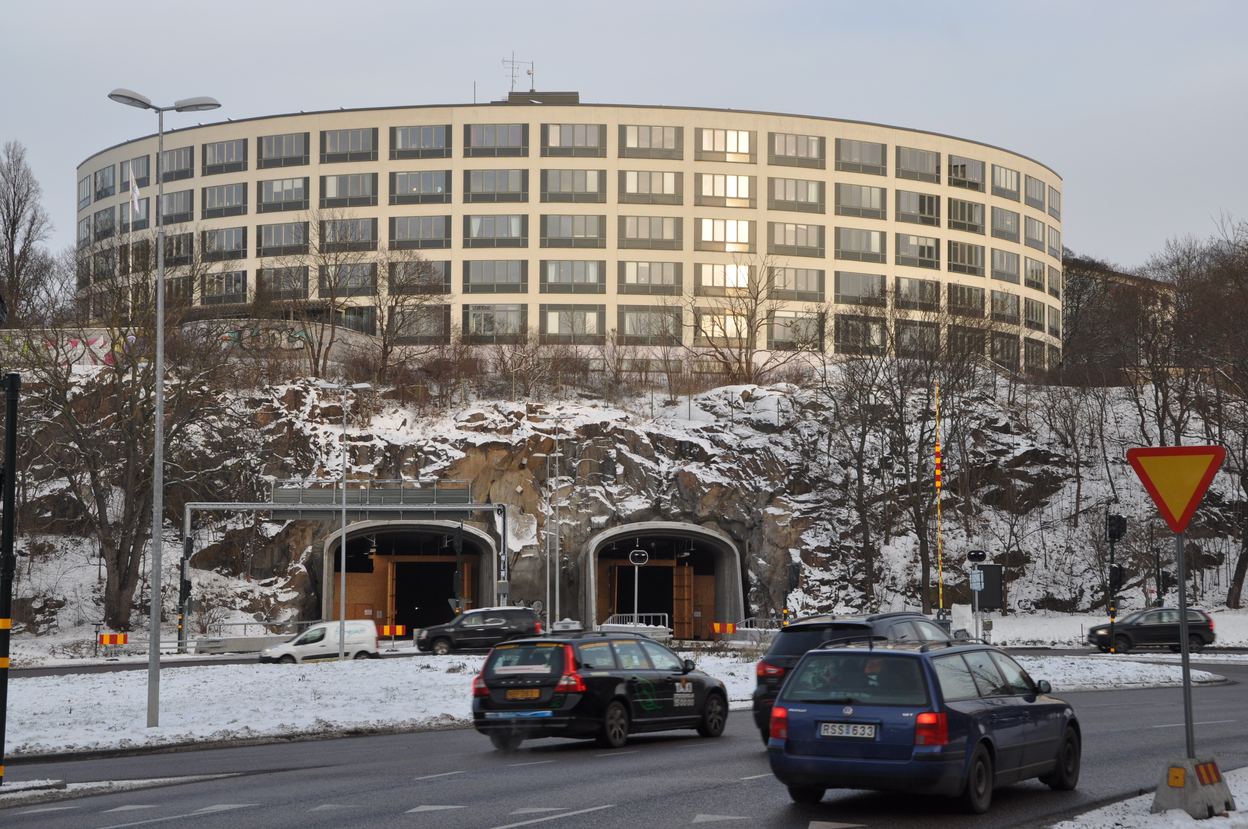 Kattrumpstullen 5, 2014. Byggår 2003. Arkitekter: White